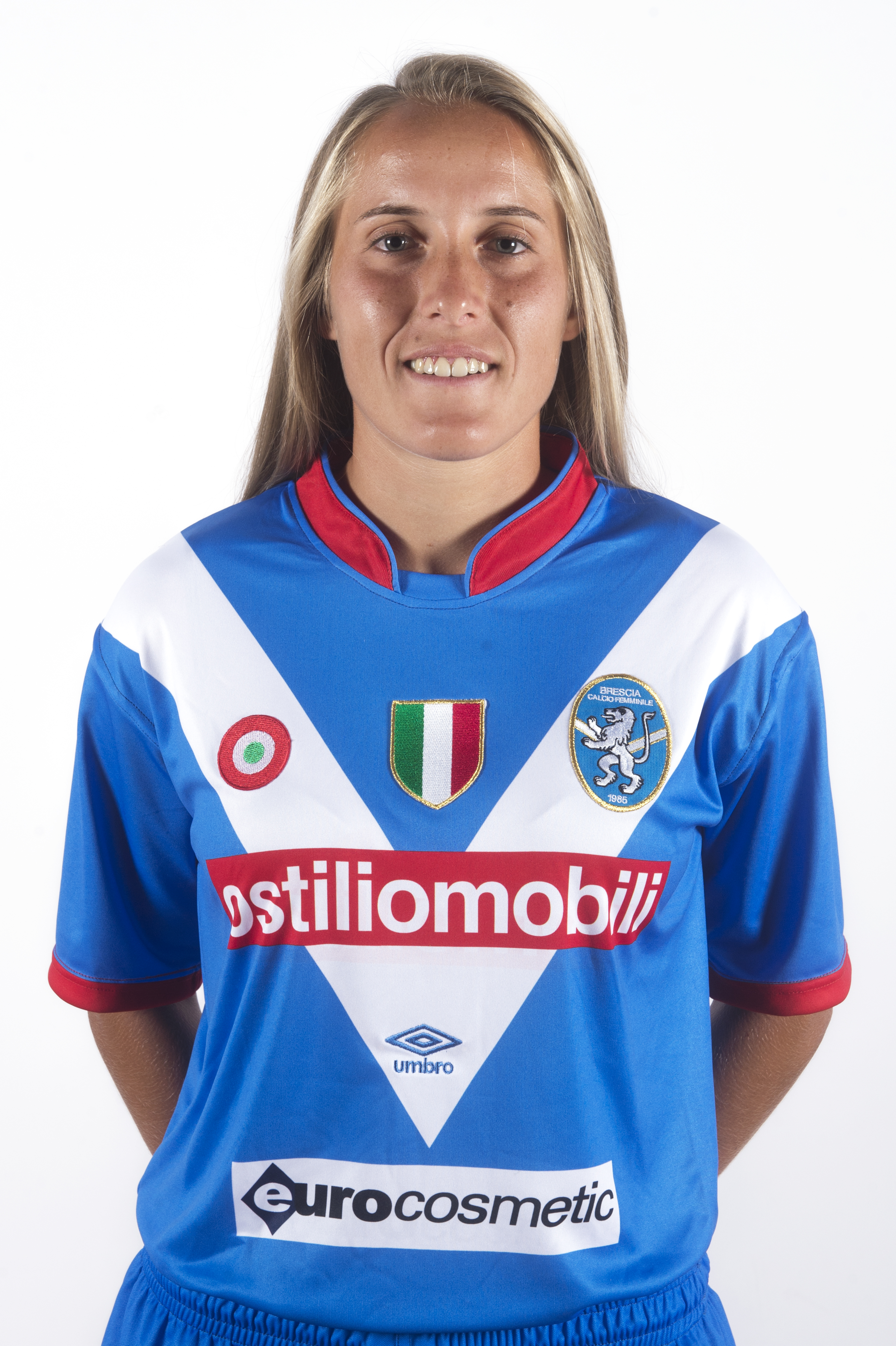 Valentina Cernoia, centrocampista e capitano del Brescia, foto ufficiale Brescia Calcio Femminile stagione 2016-2017.